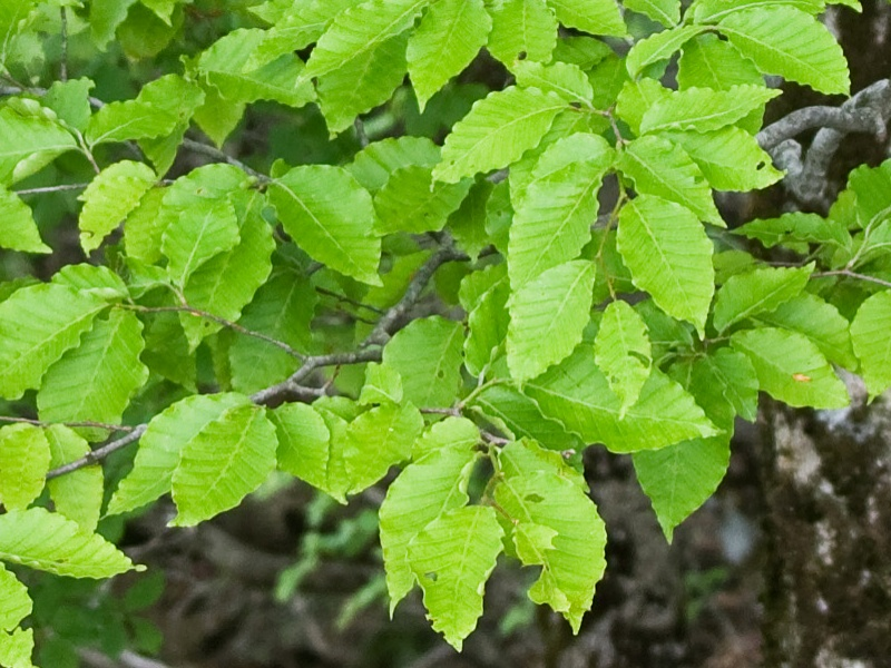 イヌブナ (学名:Fagus japonica)